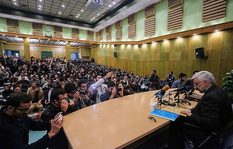 سعید جلیلی نماینده رهبر جمهوری اسلامی ایران در شورای عالی امنیت ملی در همایش "زنده باد مرگ بر آمریکا" که در دانشگاه تهران برگزار شد